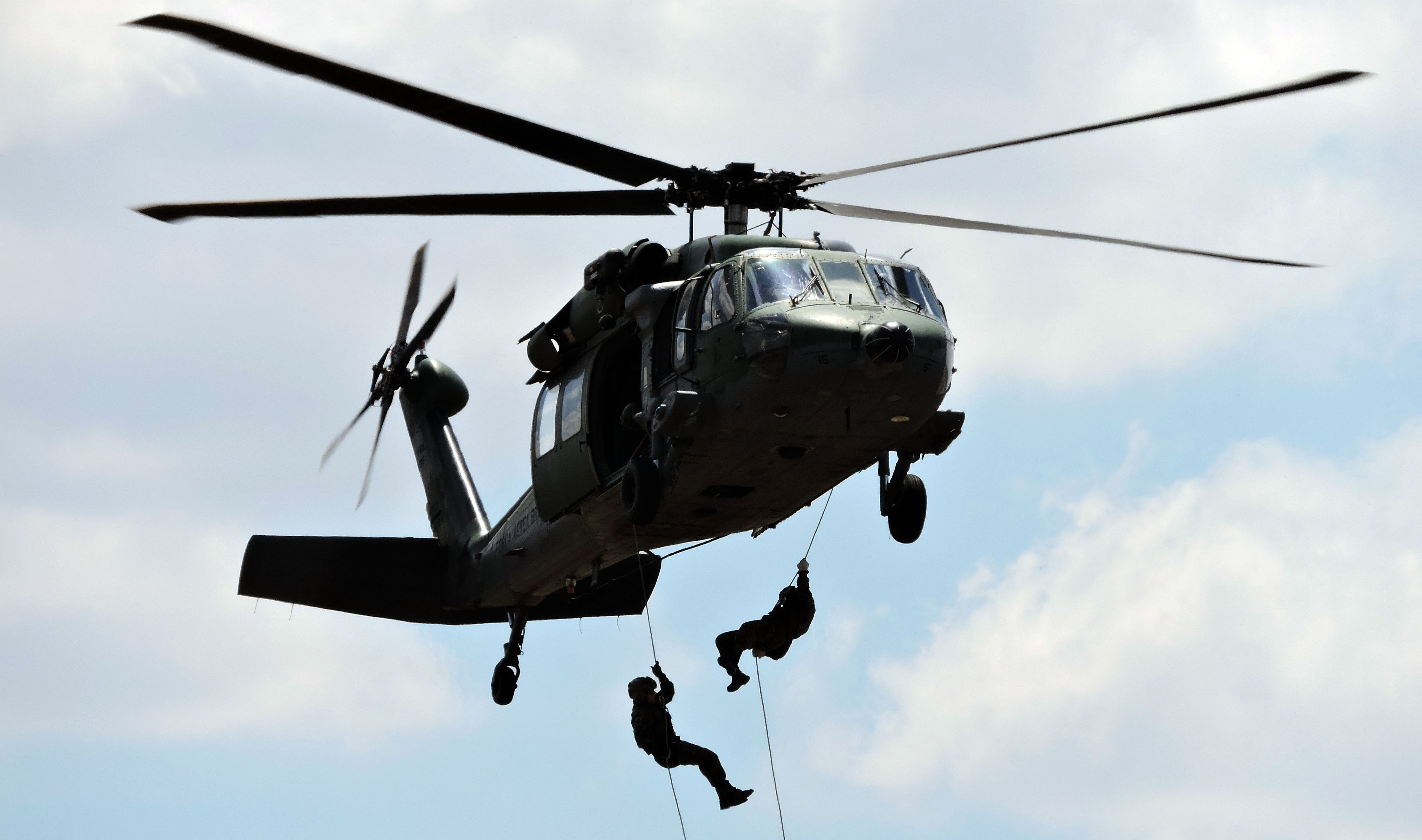 13/09/2014, Anápolis - GO Fotos: Jorge Cardoso